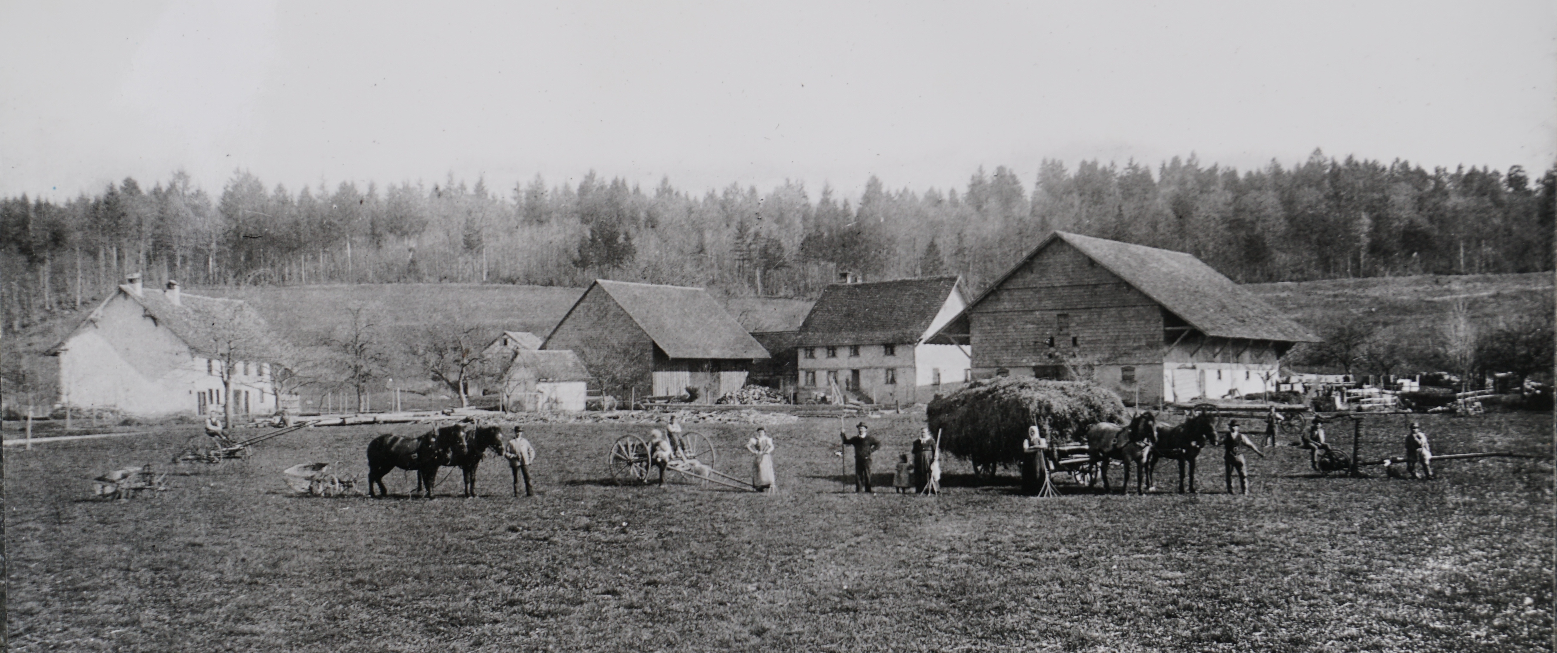 Kundelfingerhof 1901 mit Belegschaft, Besitzerfamilie Spiess (drei Generationen im mittleren Bildteil)